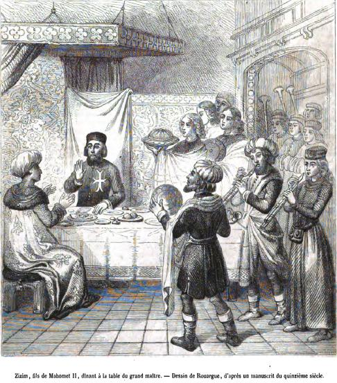 Zizim [Cem], fils de Mahomet II avec Pierre d'Aubusson, grand Maitre de l'ordre de Malte, d'aprés Rouargue